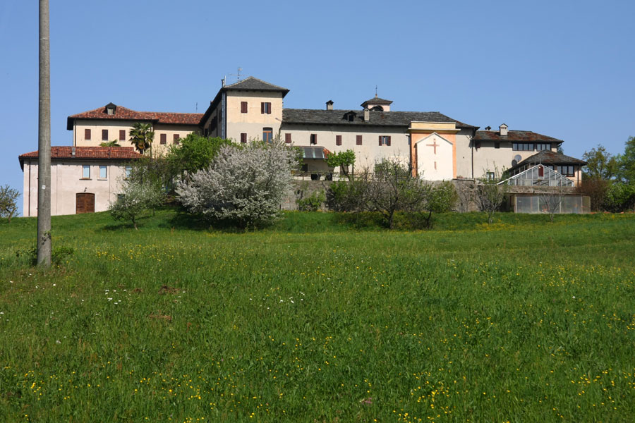 Il convento francescano sulla cima del Monte Mesma, Ameno (NO)